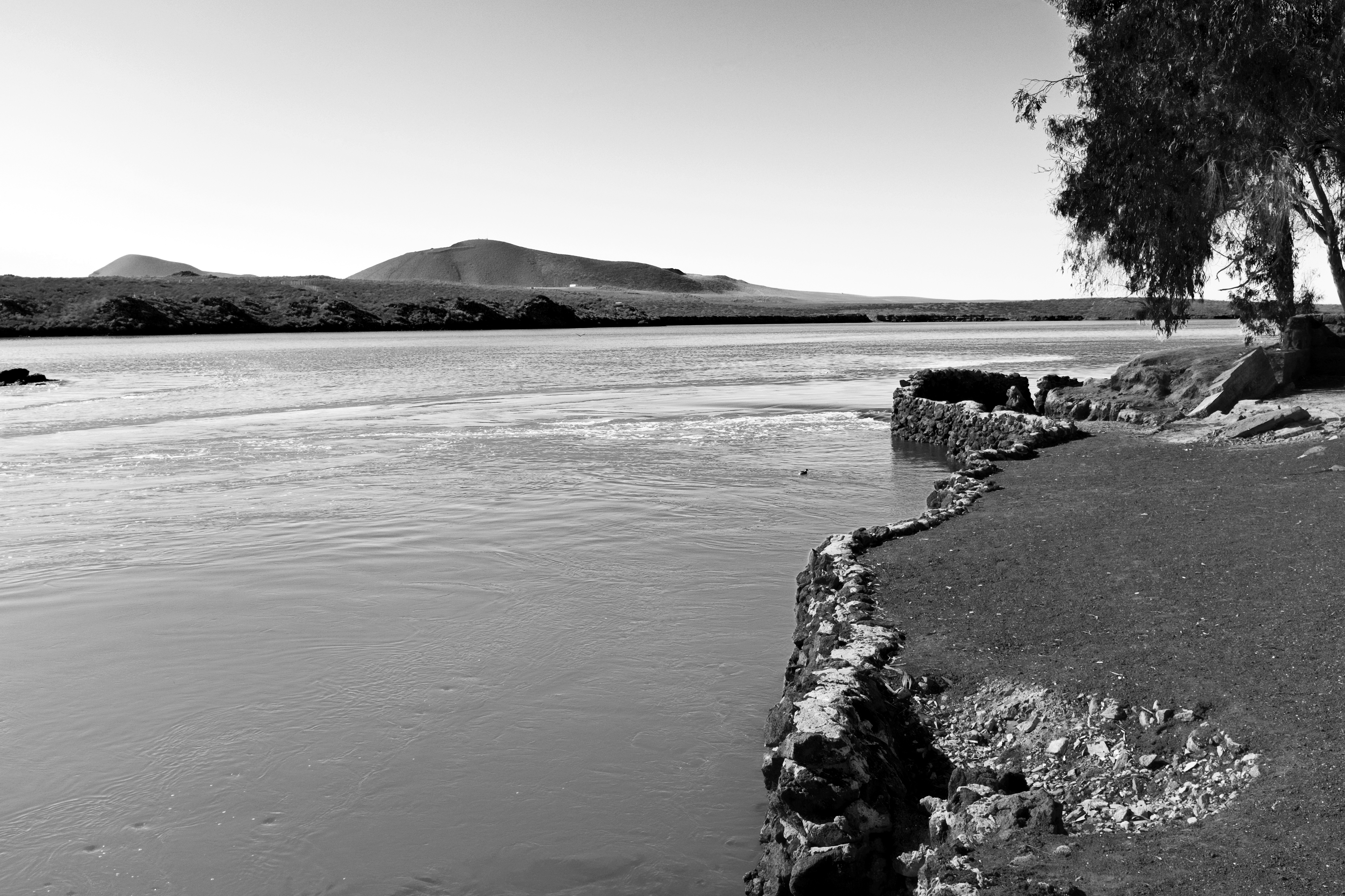 El Bahía de San Quintín, en Baja Calfornia, México